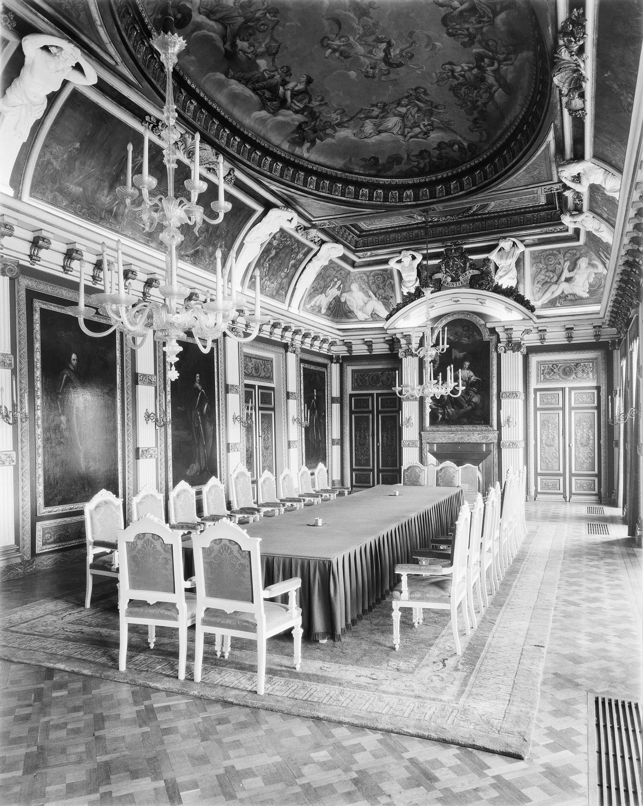 Binnenhofcomplex Trêveszaal: interieur na de restauratie